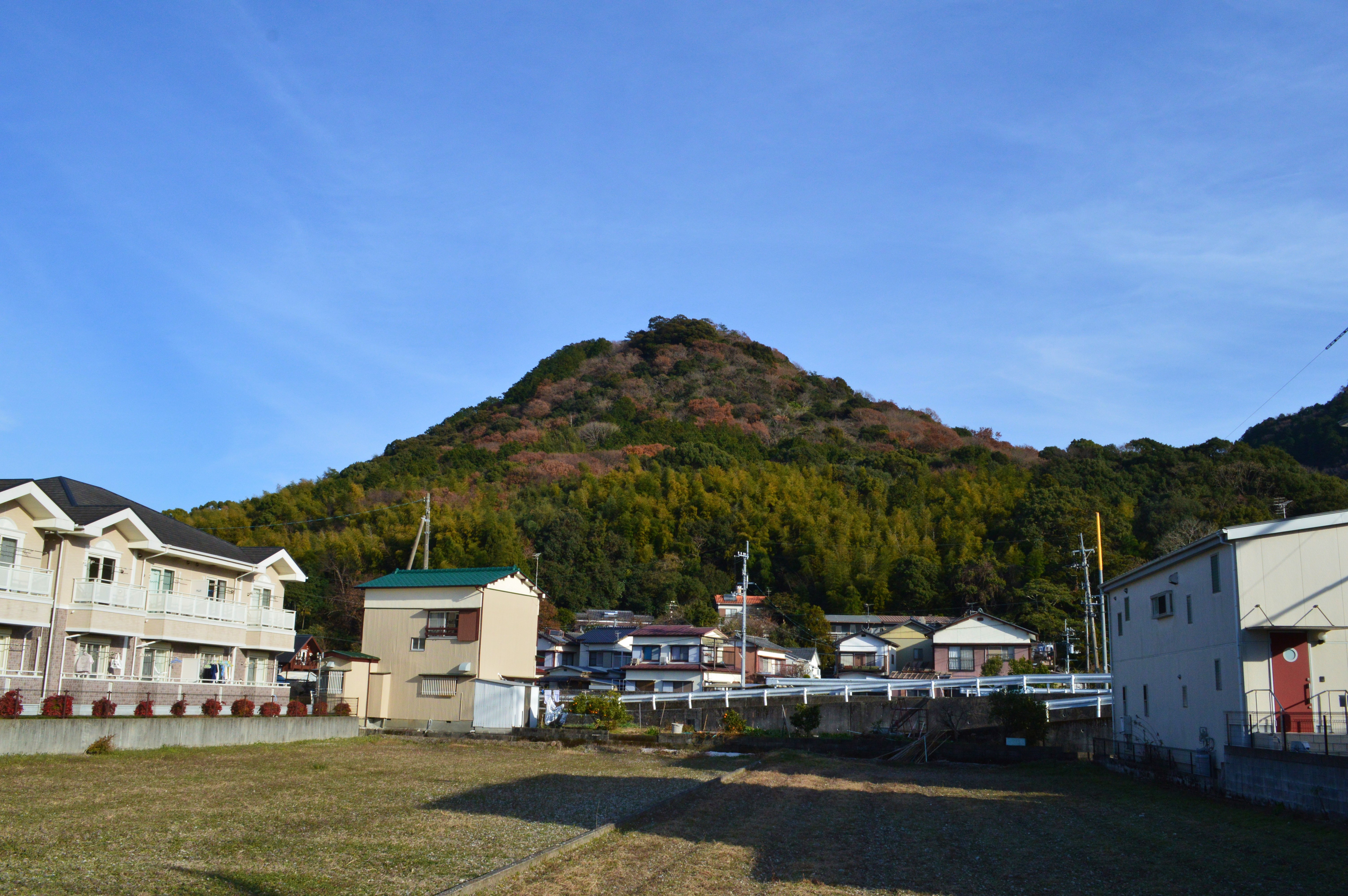 介良富士 全景